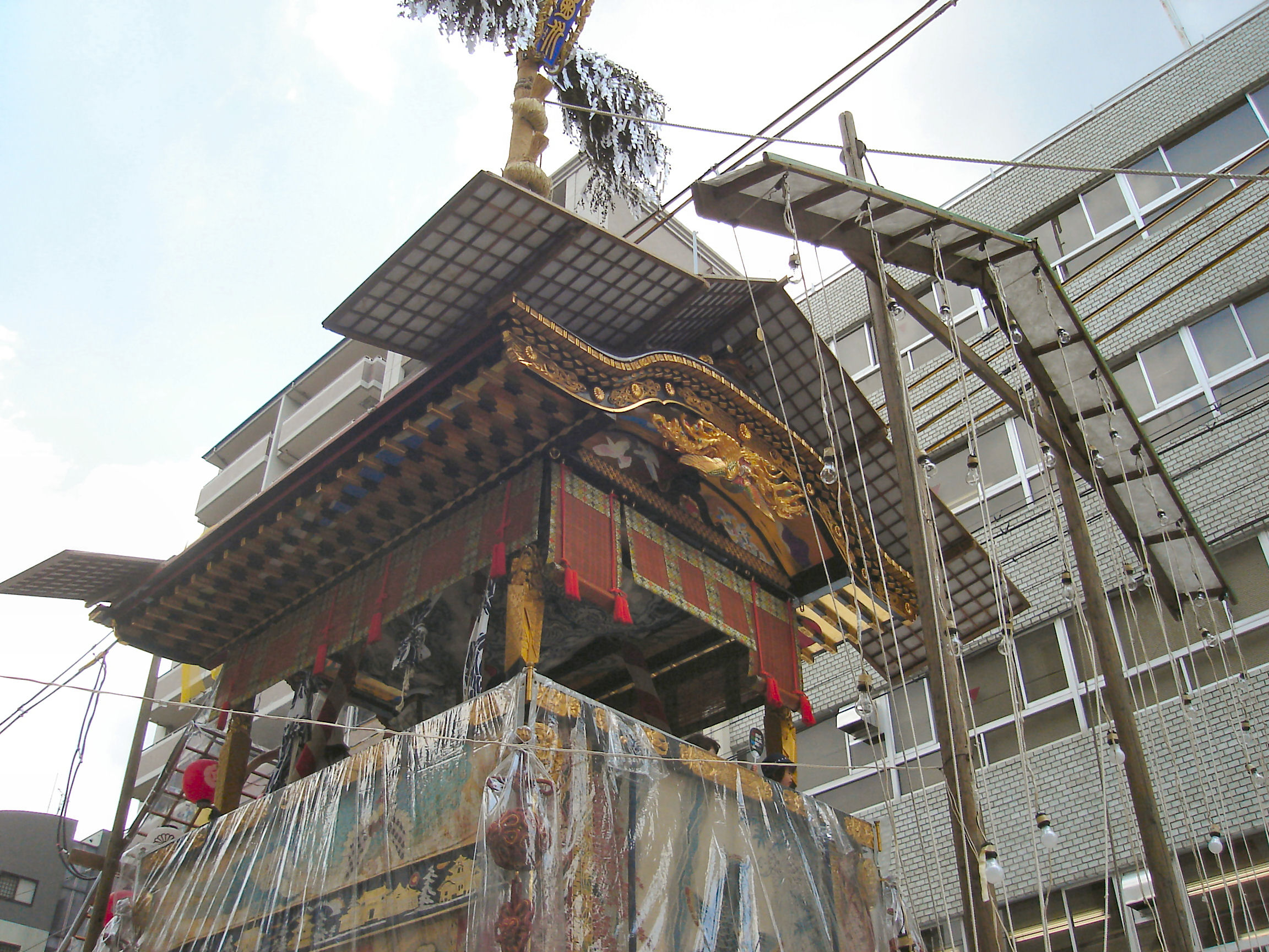 Kikusui boko(菊水鉾)